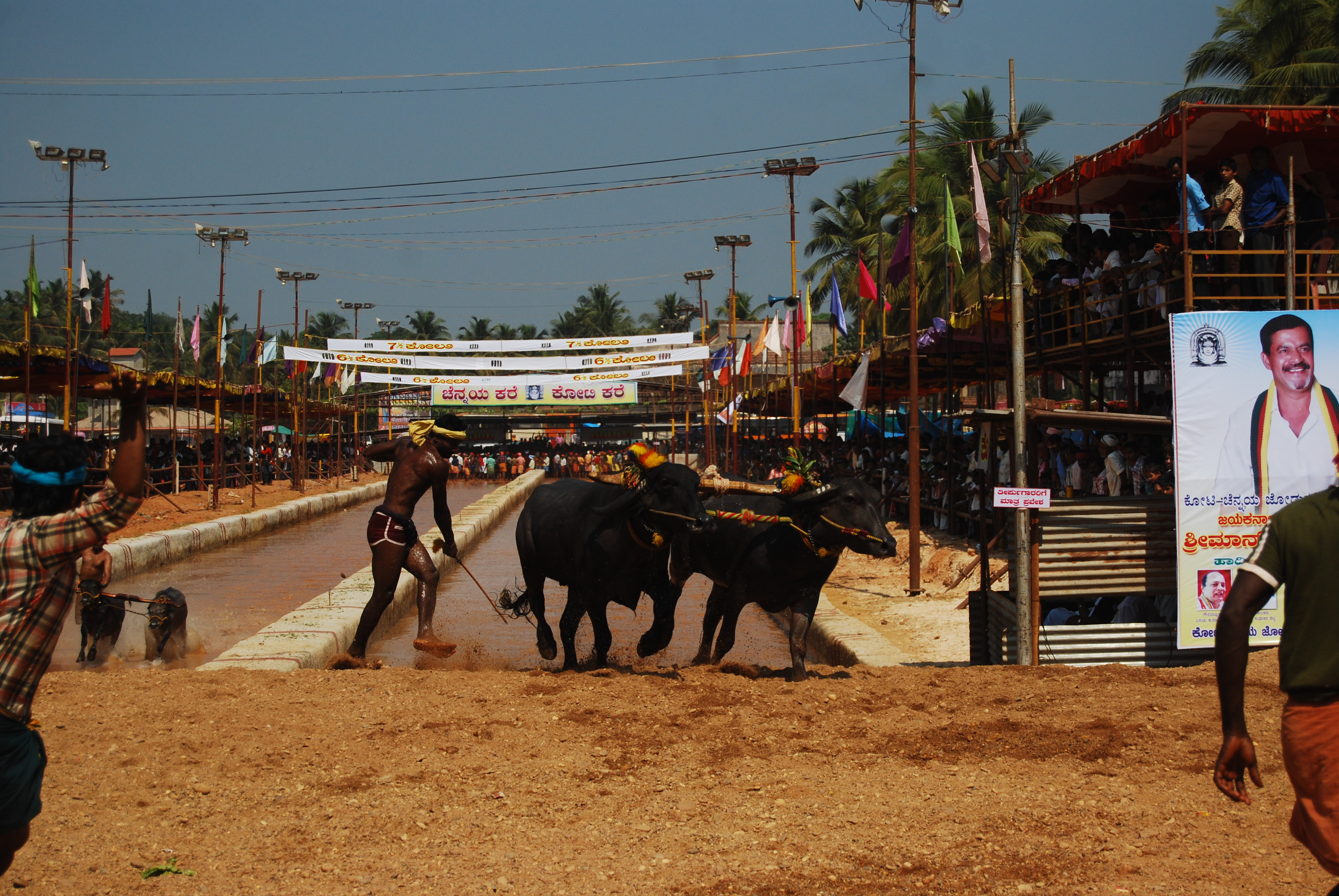 ಕನ್ನಡ: ಪುತ್ತೂರು ಕೋಟಿ ಚೆನ್ನಯ ಕಂಬುಲ